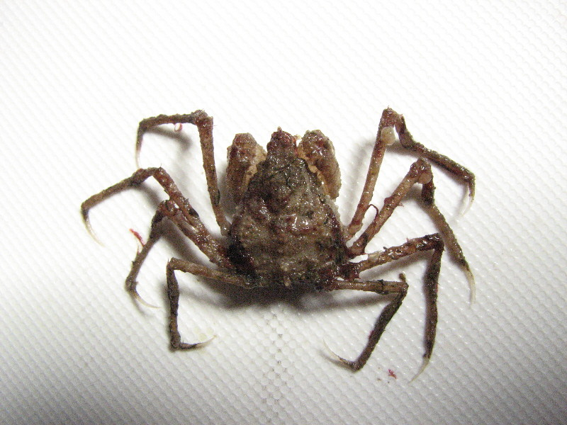 Pyromaia tuberculata(イッカククモガニ)